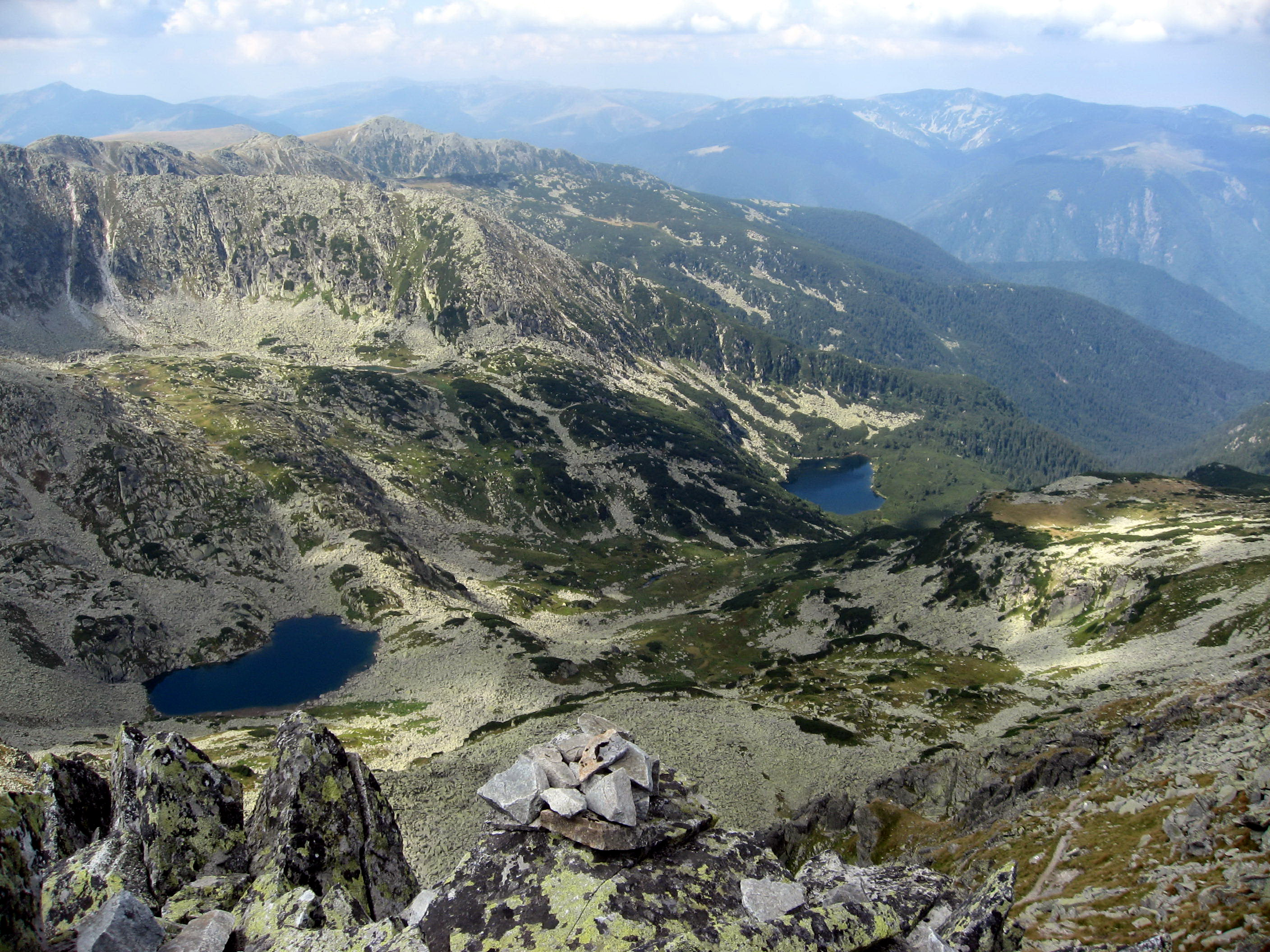 Jezera v Retezatu, asi L. Sibre a L. Gemenele